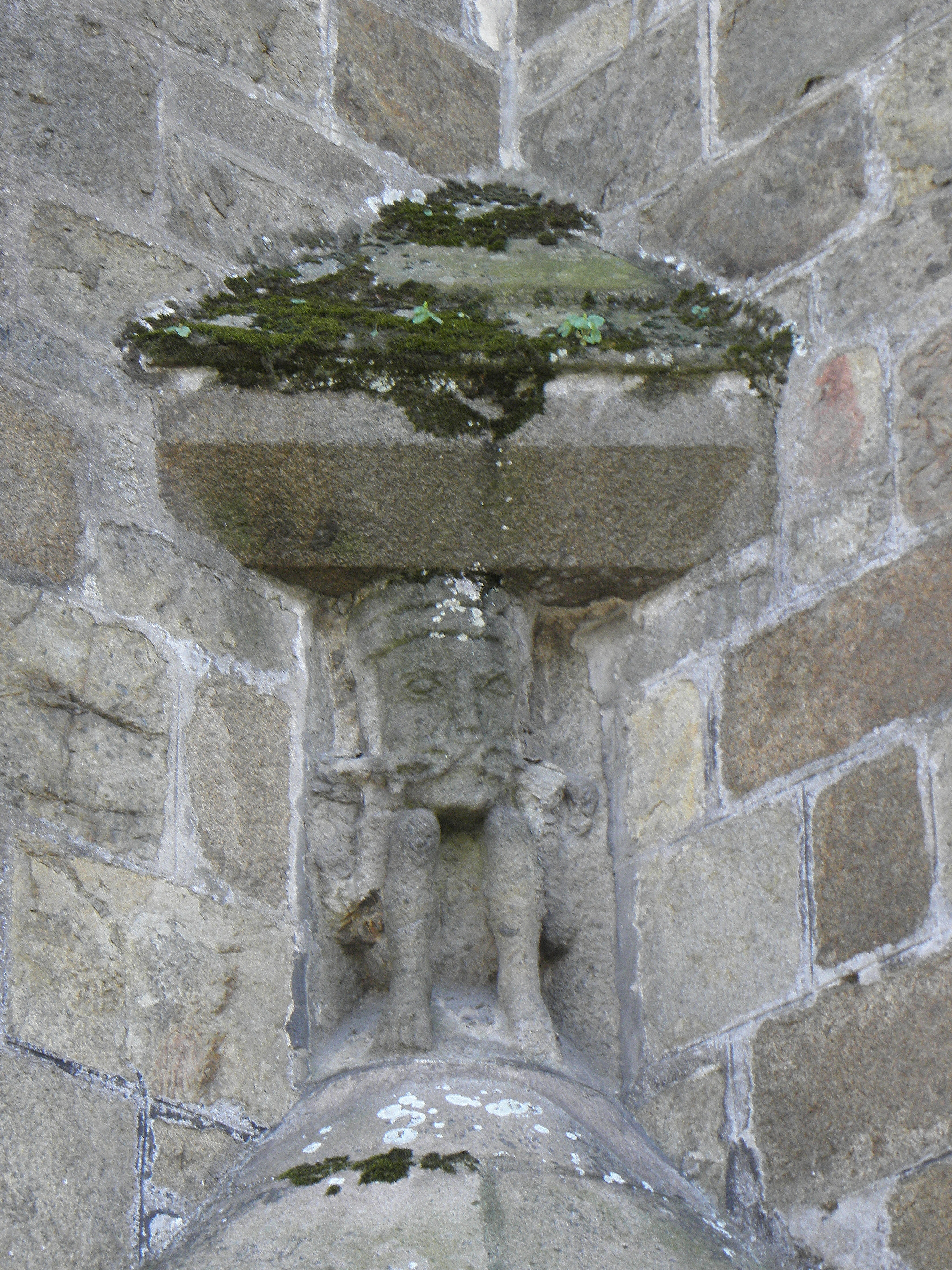 Le chiot. Sculpture du transept nord de la cathédrale Saint-Étienne de Saint-Brieuc (22).